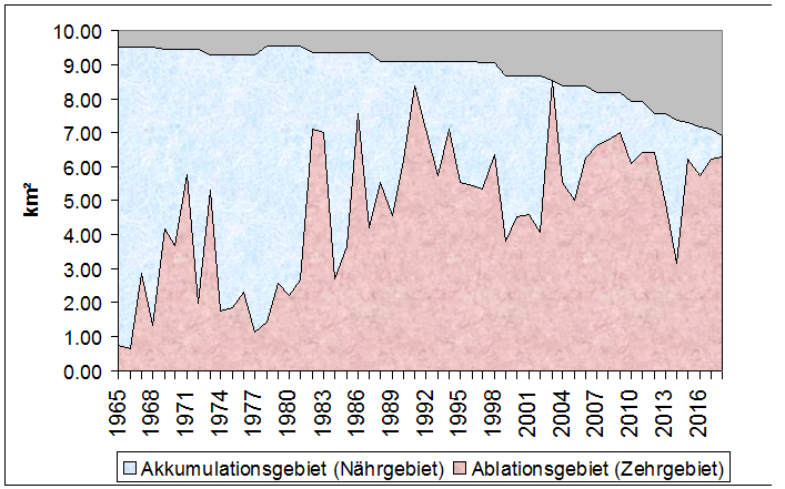 Fläche des Vernagtferners seit 1965(differenziert nach Nähr- und Zehrgebiet)